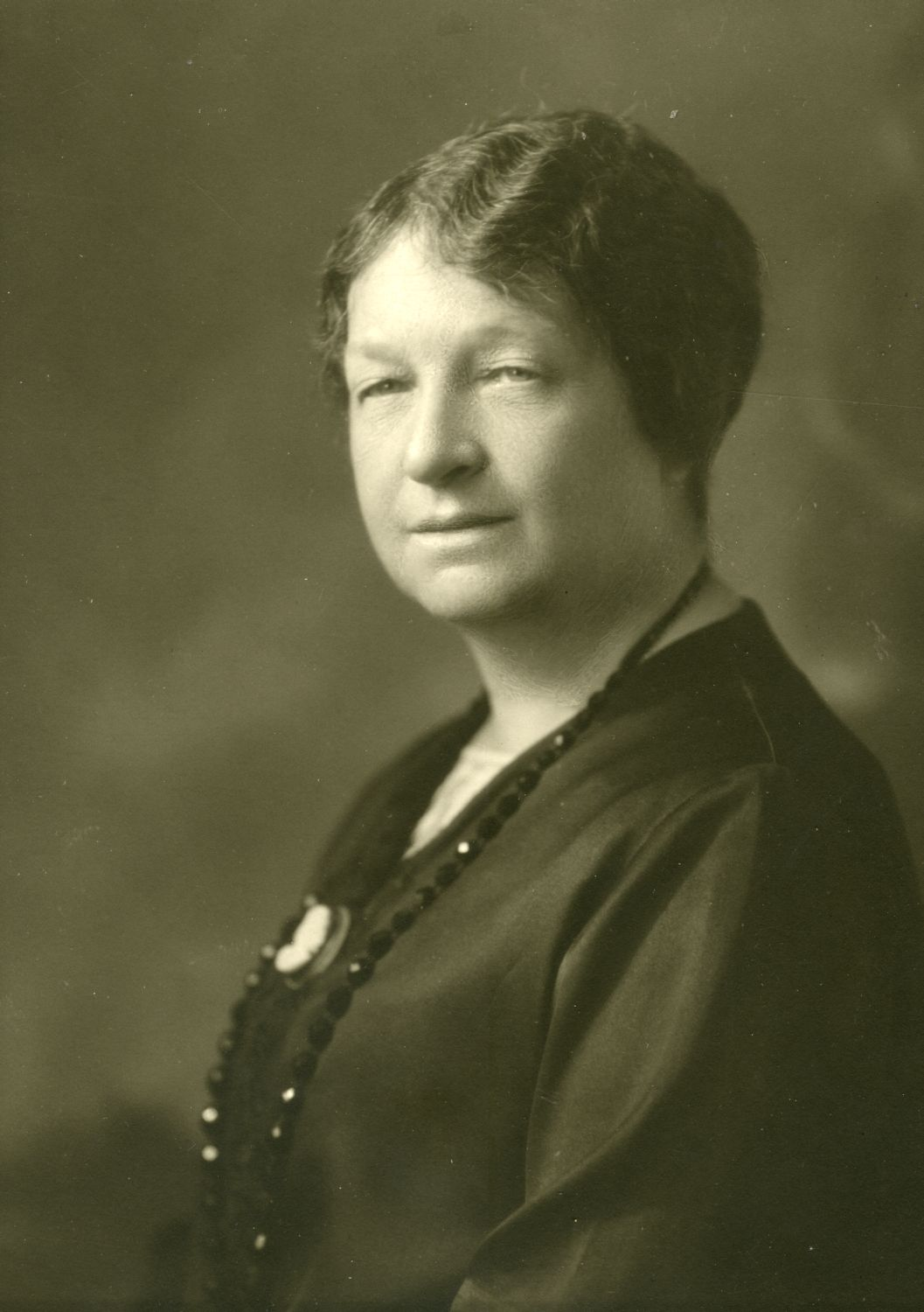 Portrait of Marie Lacoste-Gérin-Lajoie (1867-1945), a feminist from Quebec